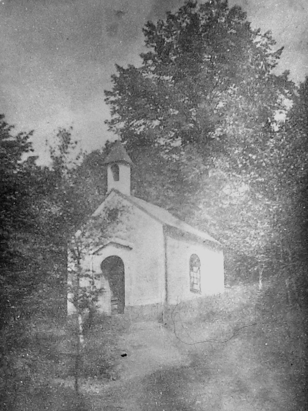 Kaple Kalvárie ve Velkém Šenově na dobové fotografii